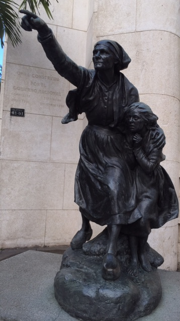 La Tempestad (1914), obra de Lorenzo González, en la entrada del Museo de Bellas Artes de Caracas.